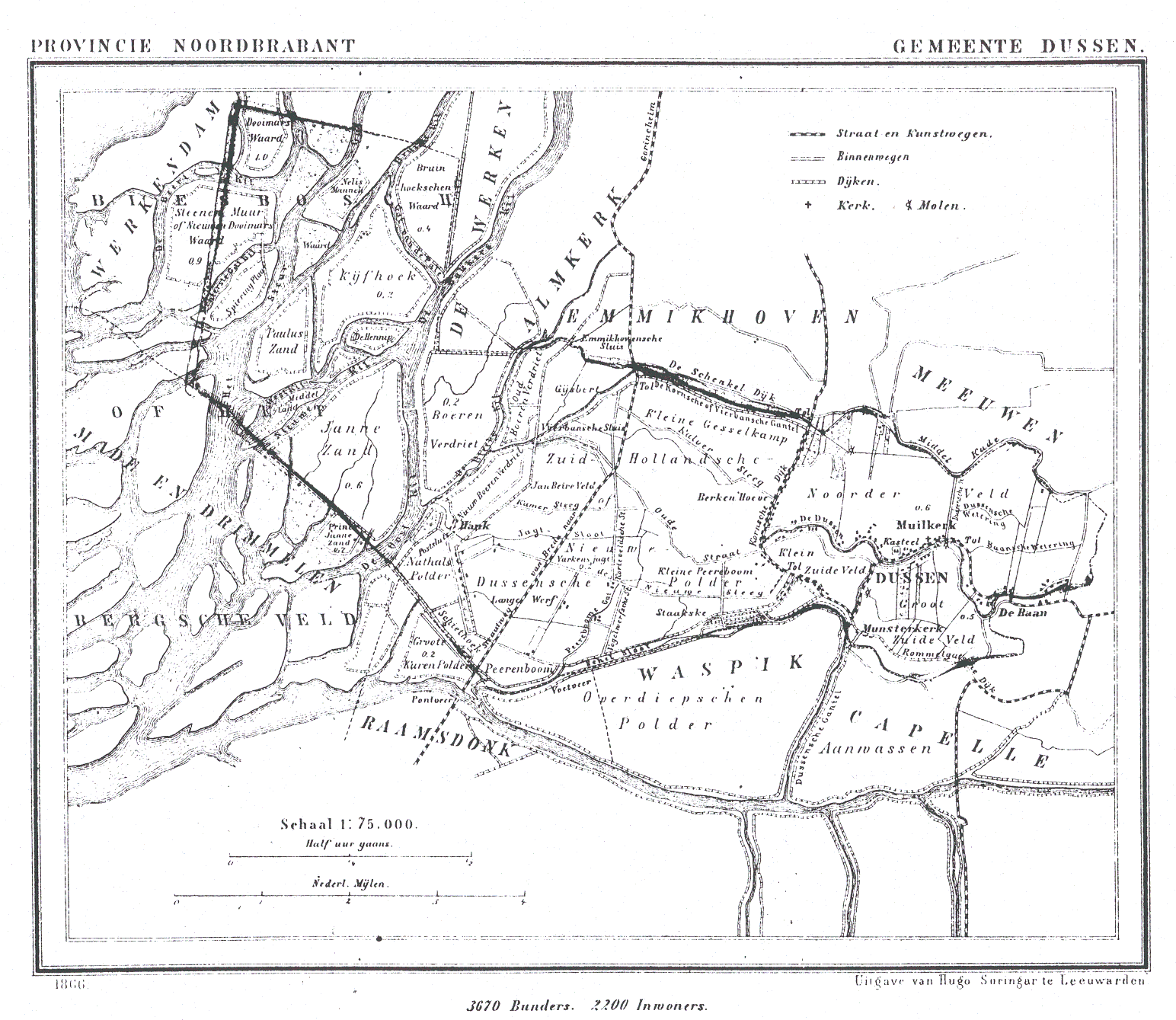 Nederland, Noord-Brabant, Gemeente Dussen